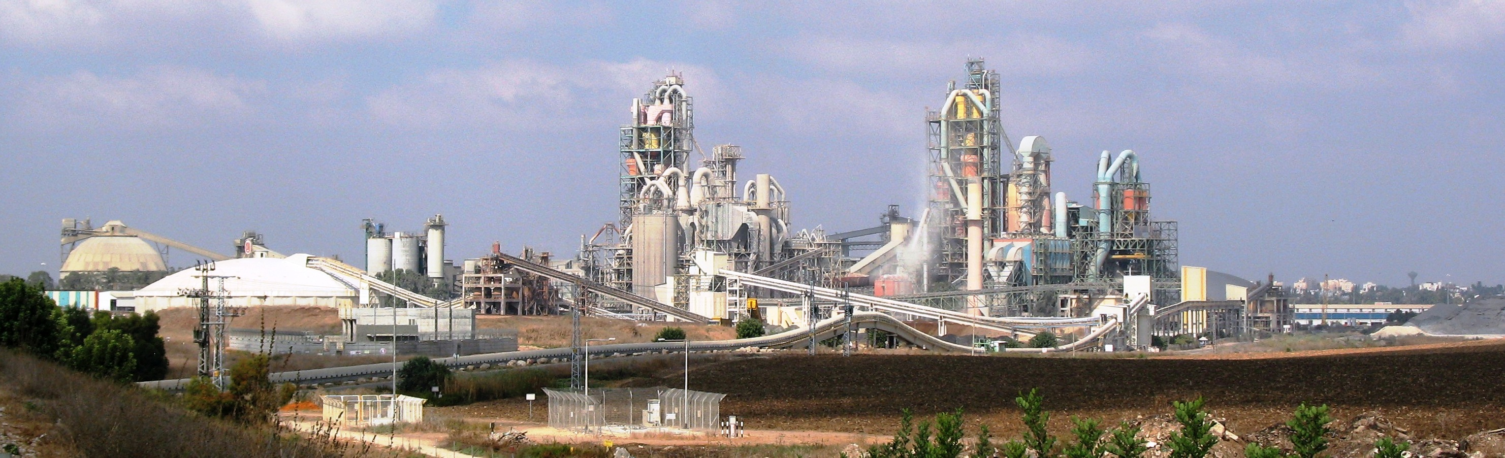 מפעלי המלט נשר ברמלה, מבט מערבה מכביש מספר 6